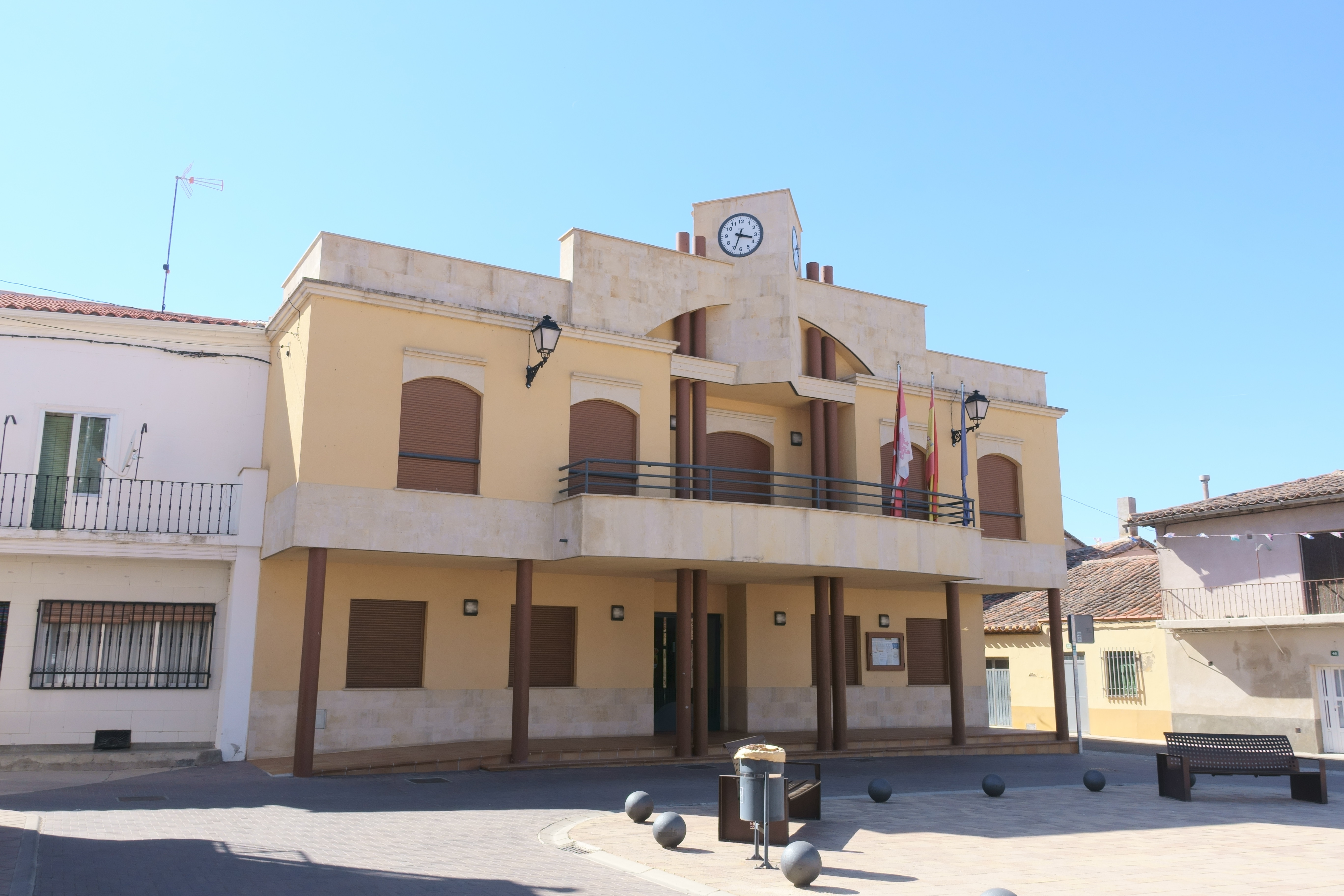 Casa consistorial de Fuentelapeña (Zamora, España).